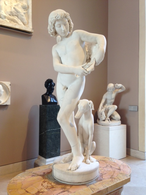 Jean-Marie Bonnassieux, L'Amour se coupant les ailes, 1838-1841, marbre, Paris, musée du Louvre